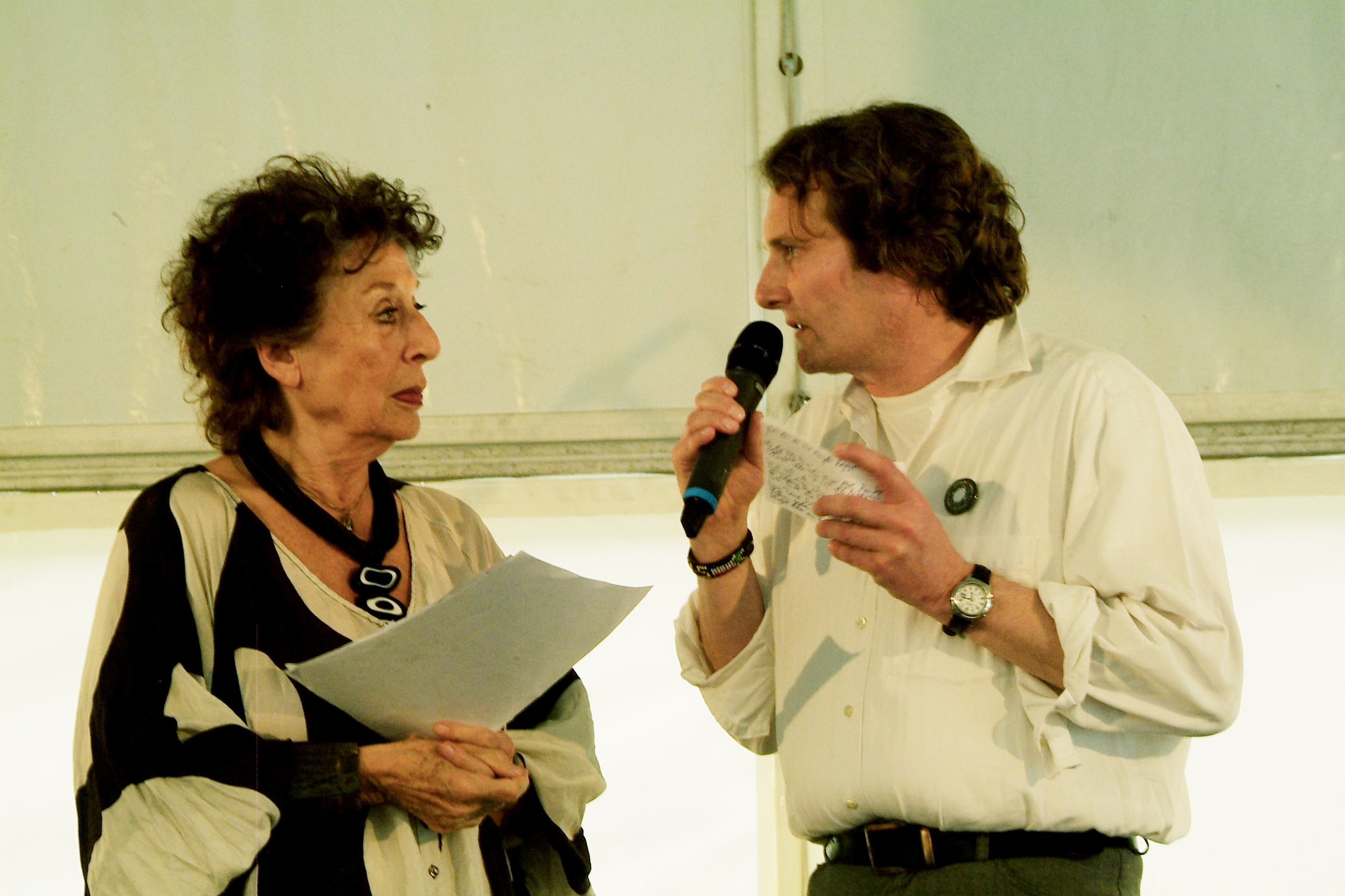 Gedenkveranstaltung zum 79. Jahrestag der Bücherverbrennungen in Hannover. Unter der Erkenntnis "... dort, wo man Bücher verbrennt, verbrennt man am Ende auch Menschen" fanden durch die Inititative "Hannover im Wort" verschiedene Veranstaltungen statt, darunter die am Opernplatz mit Lesungen verfolgter Autoren bzw. von Ihnen verbrannter Bücher. Hier: Lea Rosh (Lesung) und Marc Beinsen (Moderation).